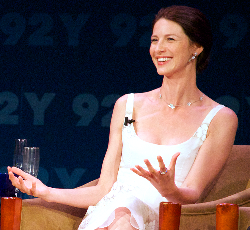 OLNY_106